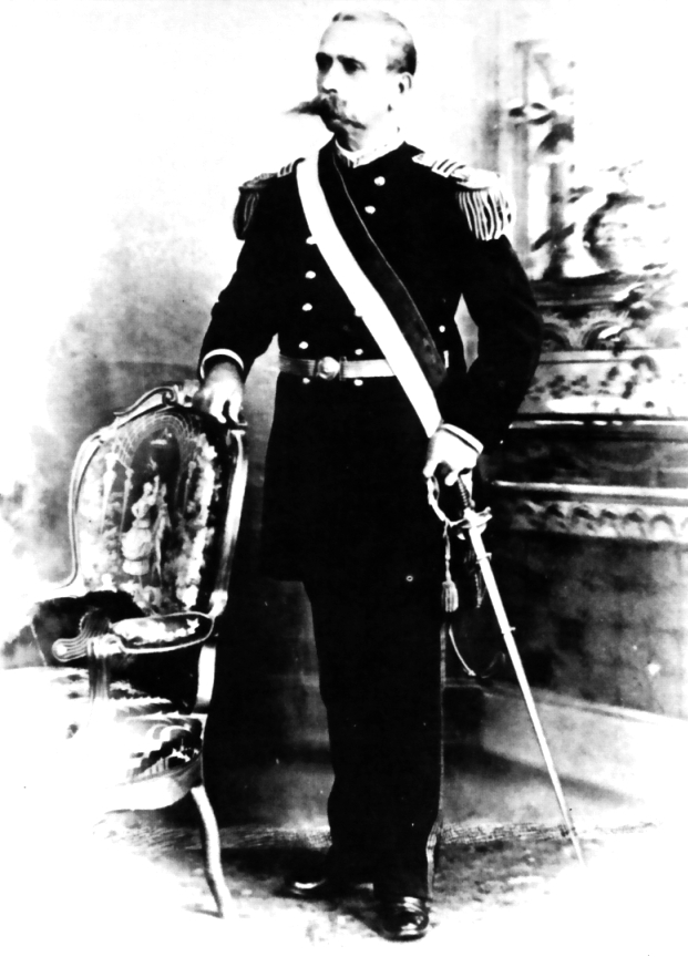 Justiniano Borgoño (1836-1921), militar y político peruano, presidente interino del Perú en 1894.